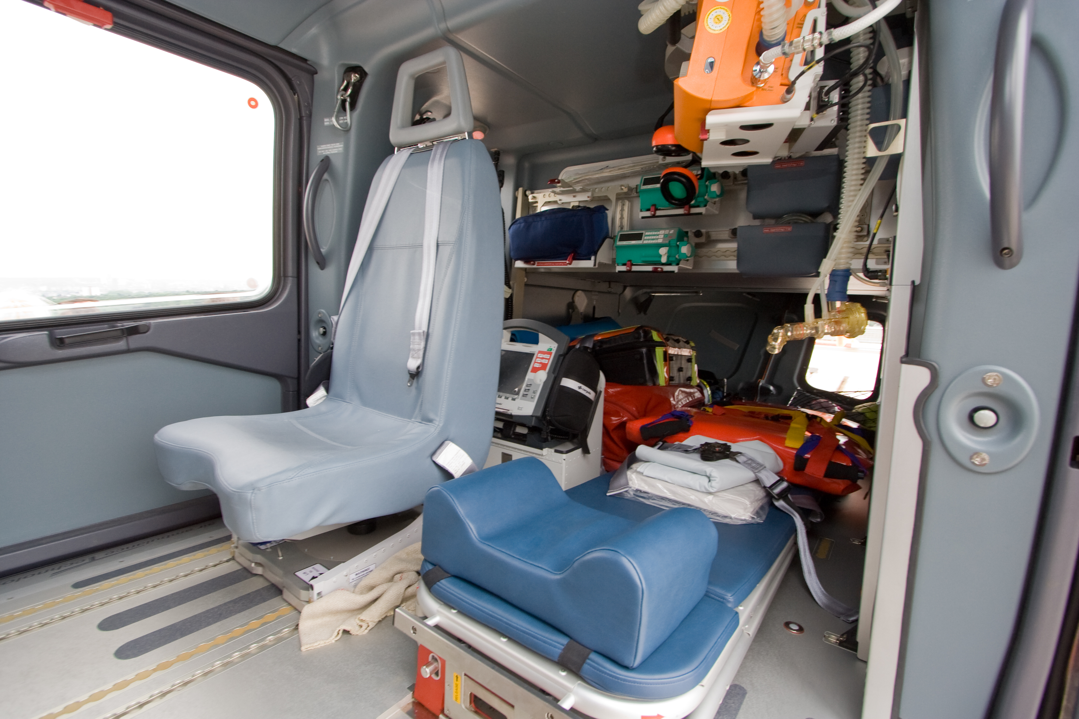 Innenansicht eines Rettungsubschraubers des Typs EC 135